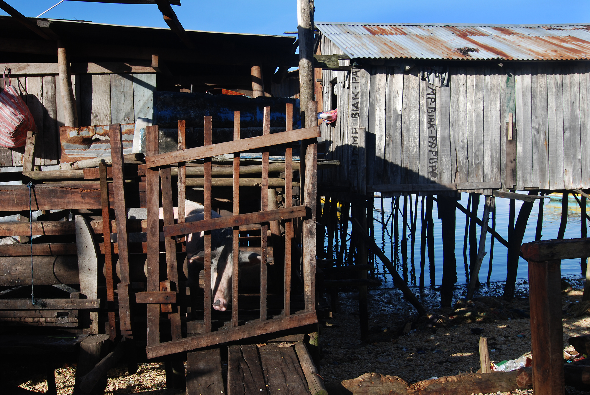 Rumah kayu di tepi pantai Biak dengan hewan ternak